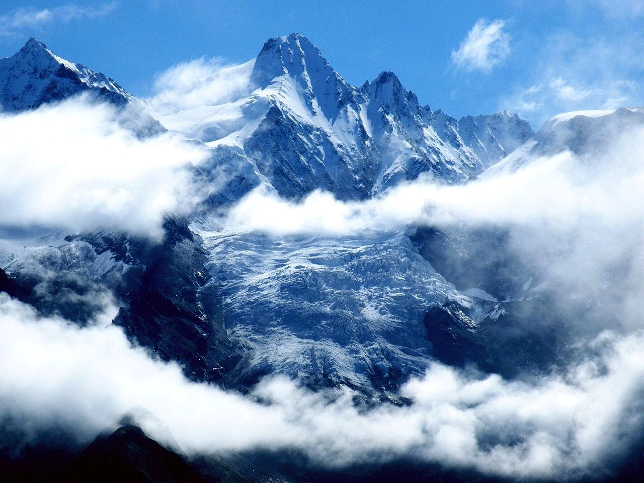 Gebirge vom Topali-Weisshorn-Höhenweg im Mattertal aus gesehen